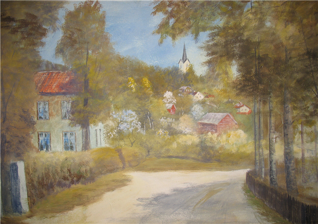 Fresk av Einar Hillberg föreställande Kyrkbacken i Bräcke. En av de fresker som Einar Hillberg målade i sin sons, Ove Hillbergs, nybyggda hus i Eskiltuna 1953.